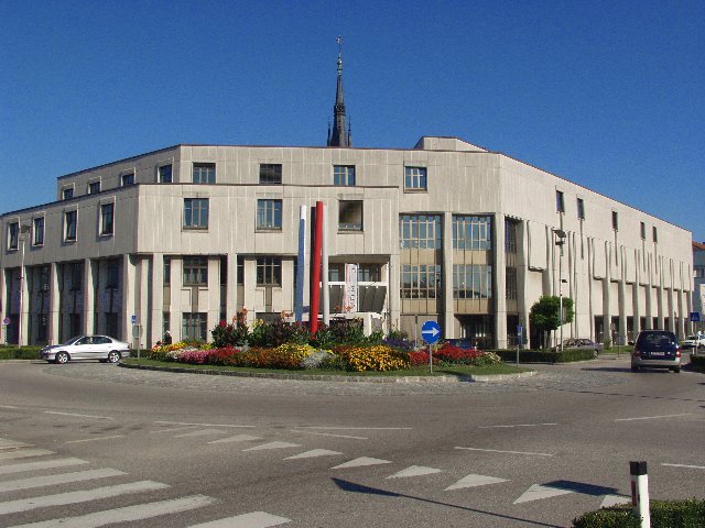 Stadtamt Traun - selbst fotografiert im September 2005 (der greg:) 7.9.2005 - Lizenz: CC-BY